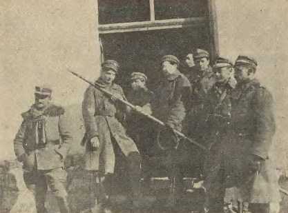 Bateria "Wicek" z 5 Pułku Artylerii Polowej w czasie walk o Lwów - na punkcie obserwacyjnym w betoniarni. Widoczni: por. dr Stefan Chrzanowski (dowódca baterii), plut. Wasilewska, kpr. Stokowska, plut. Kowalska, kpr. Bruda, plut. Ketulaniówna, ppor. Sokołowski, ppor. Krasicki.